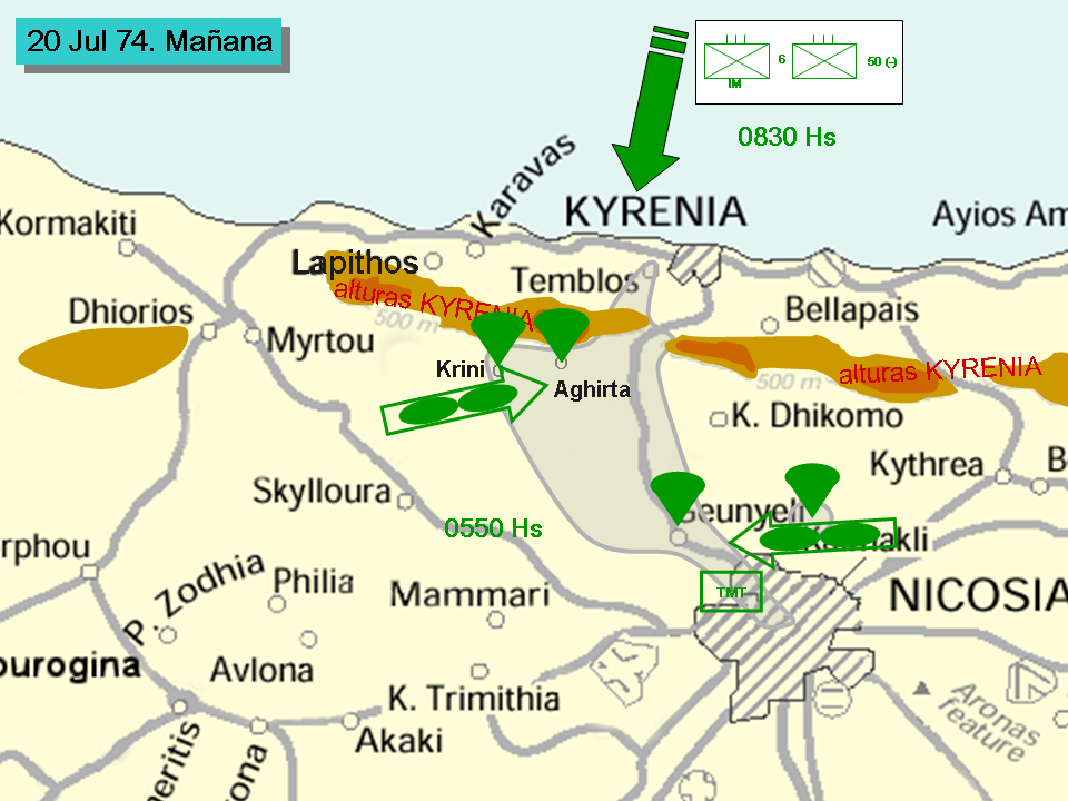 Imágen confeccionada por el Autor sobre la base de los datos obtenidos por el mismo.